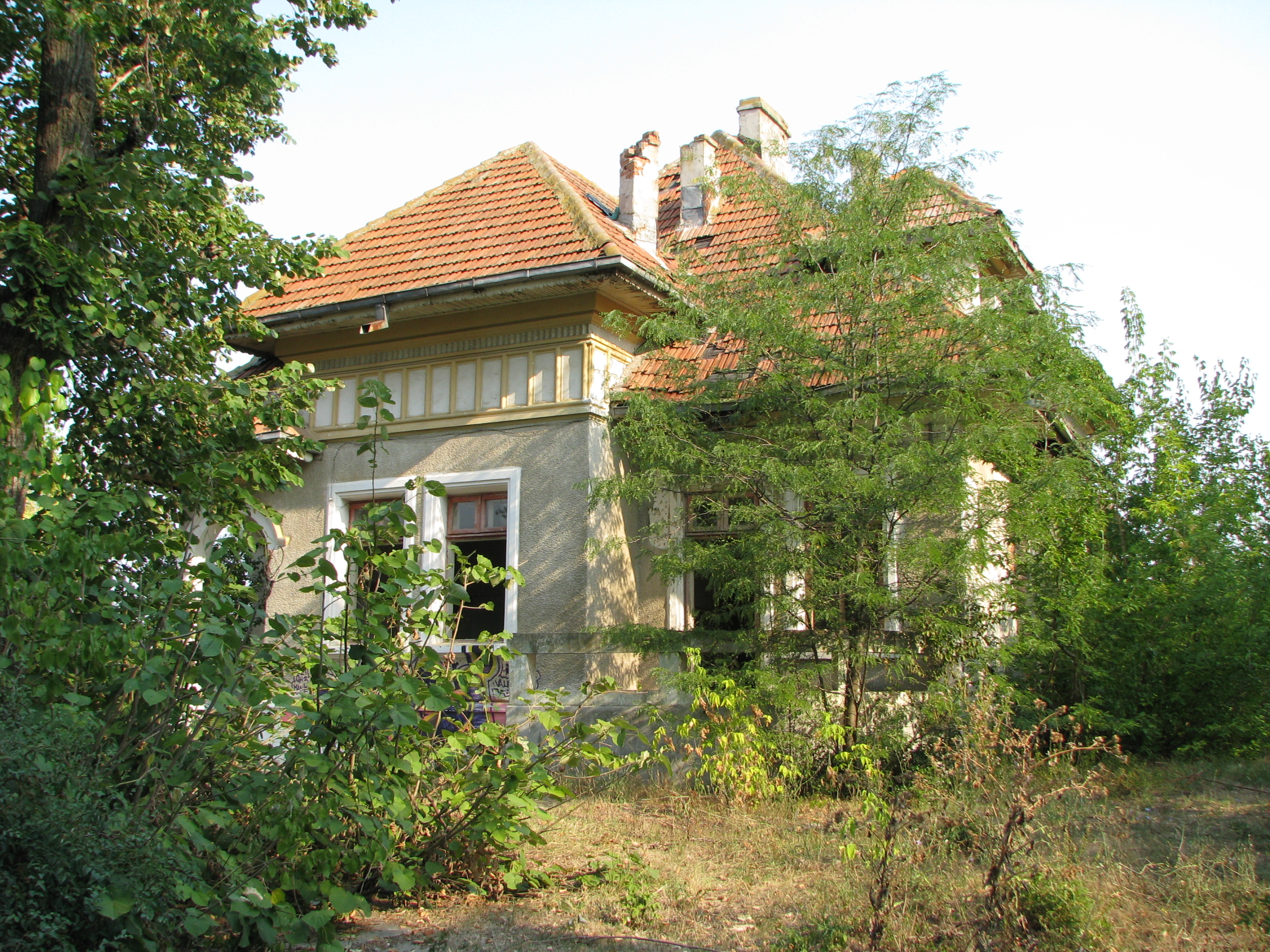 Conacul C. Angelescu, Bucșani